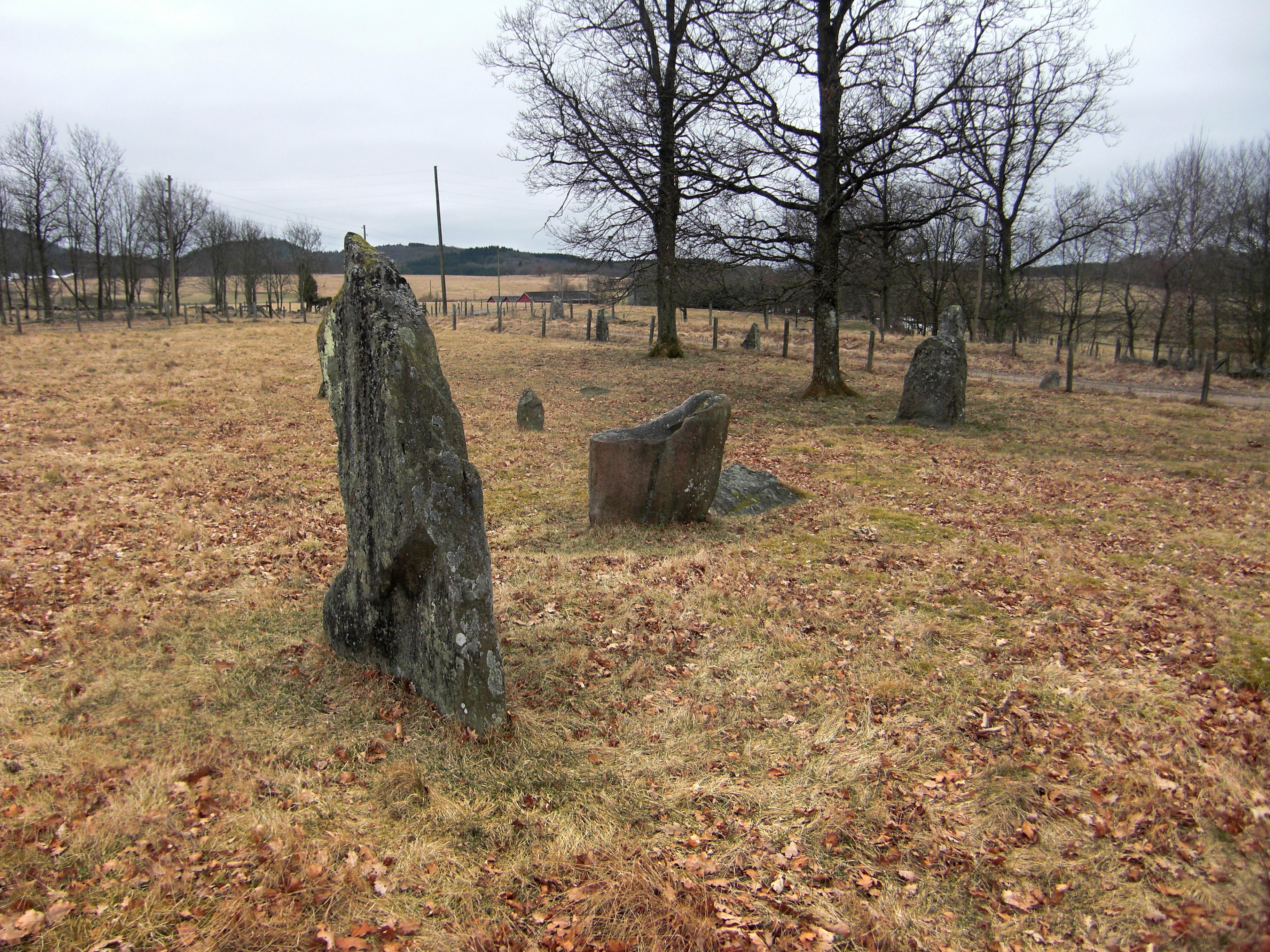 Resta stenar på gravfältet i Särestad (RAÄ-nr Årstad 40:1) i Årstads socken, Årstads härad, Falkenbergs kommun, Halland, Hallands län, Sverige.